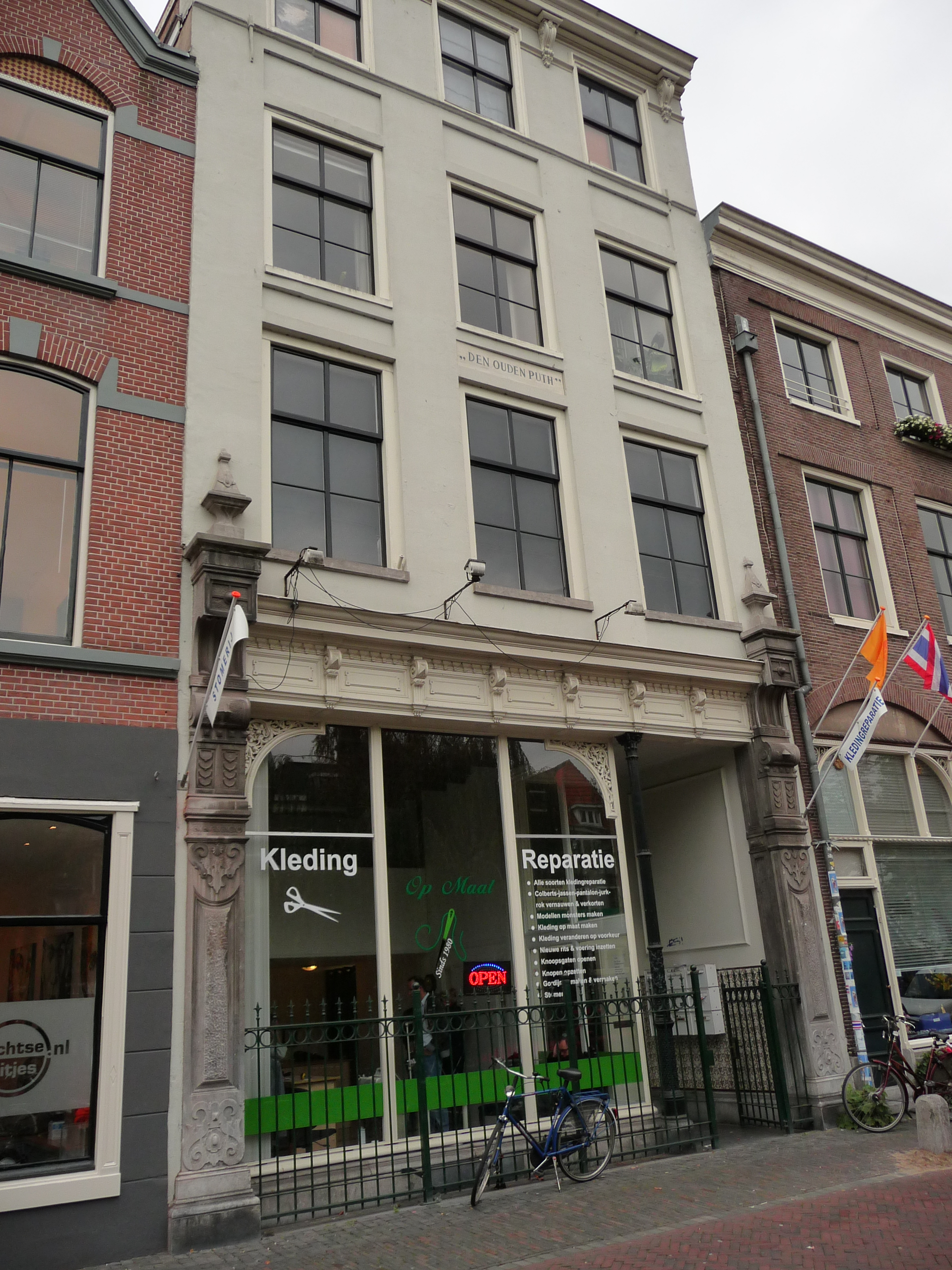 Rijksmonument aan de Oudegracht in Utrecht (stad)